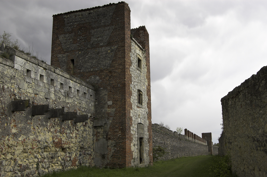 Mura settentrionali di Verona, costruite da Cangrande e ammodernate dagli austriaci nell'Ottocento